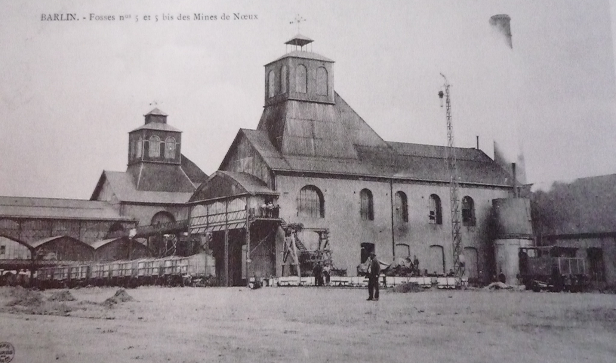 La Fosse n° 5 - 5 bis de la Compagnie des mines de Nœux était un charbonnage constitué de deux puits situé à Barlin, Pas-de-Calais, Nord-Pas-de-Calais, France.